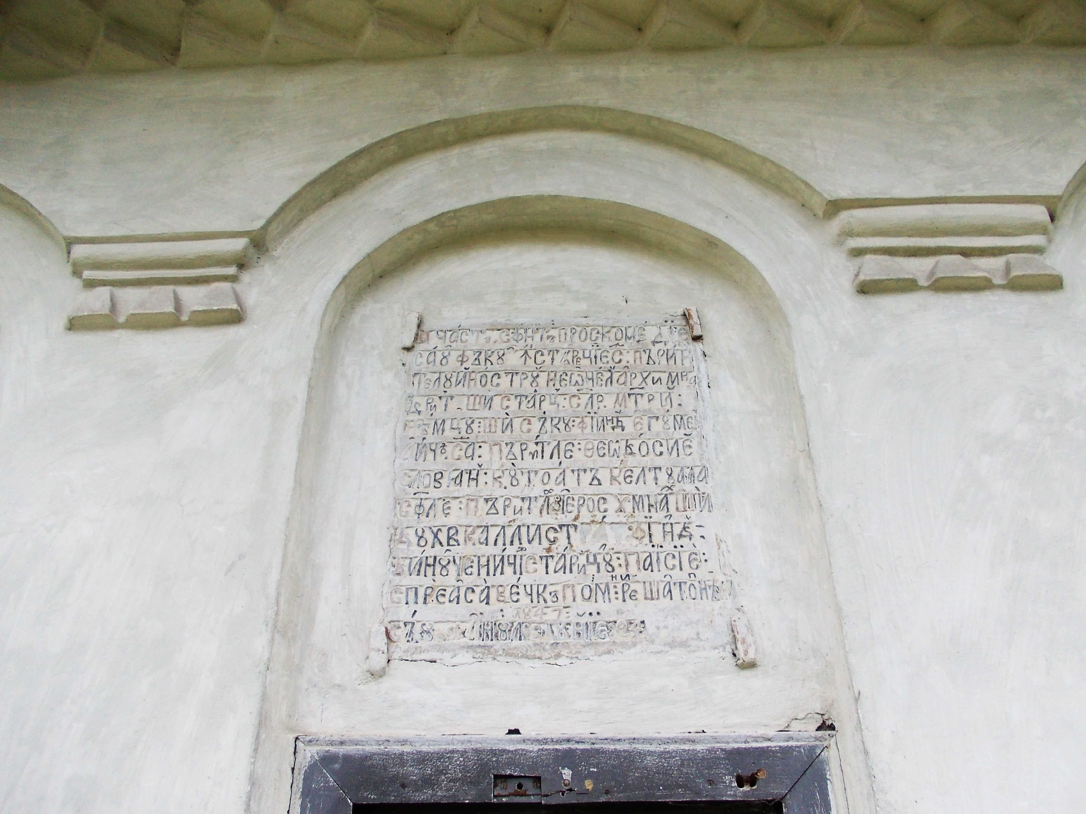 Biserica „Nașterea Sf. Ioan Botezătorul” 04